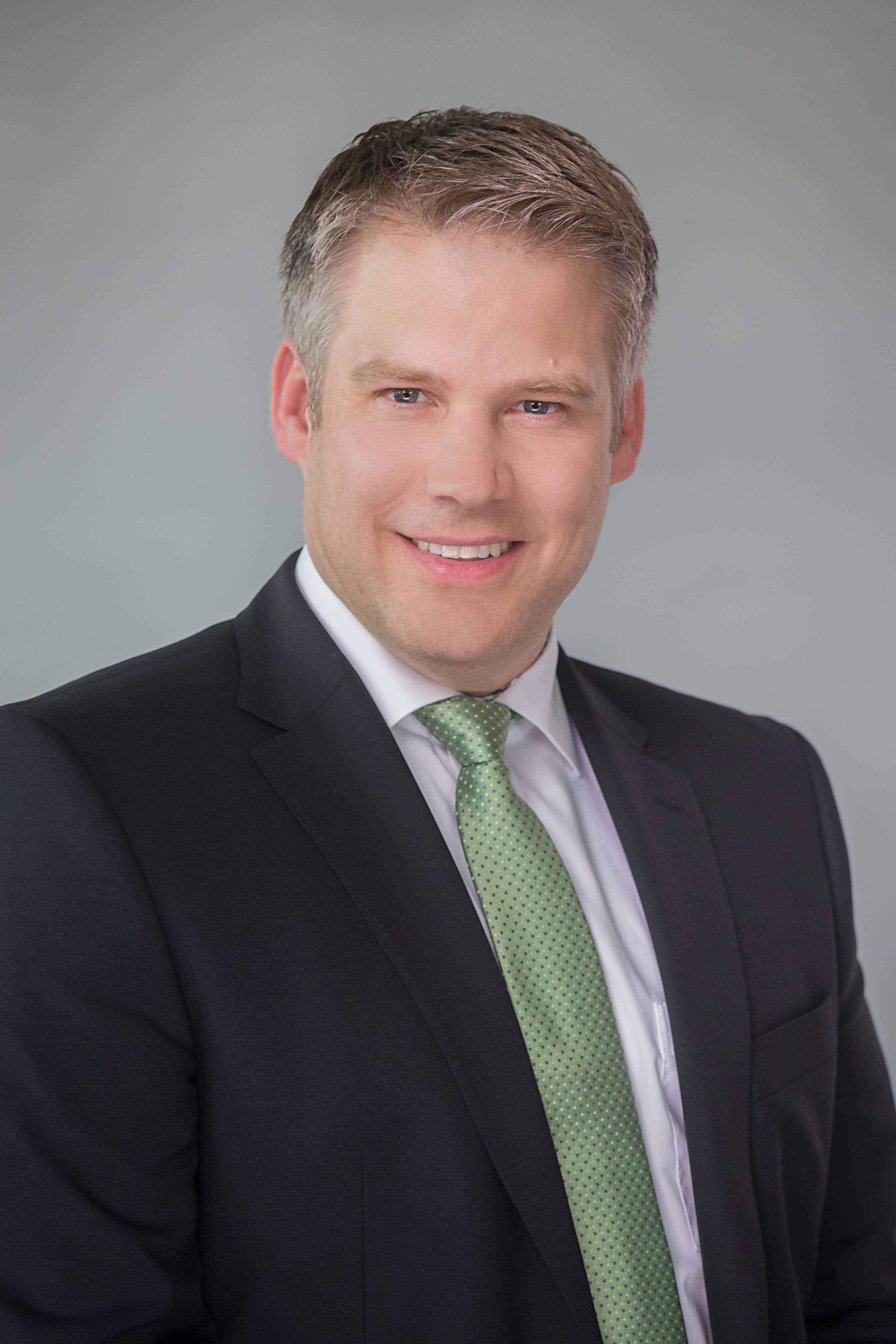 Oberbürgermeister Dr. Christian Lösel, Stadt Ingolstadt